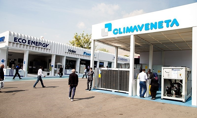 سیزدهمین نمایشگاه بین المللی تاسیسات و سیستمهای سرمایشی و گرمایشی